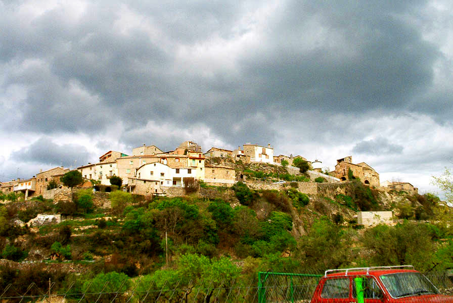 Llimiana